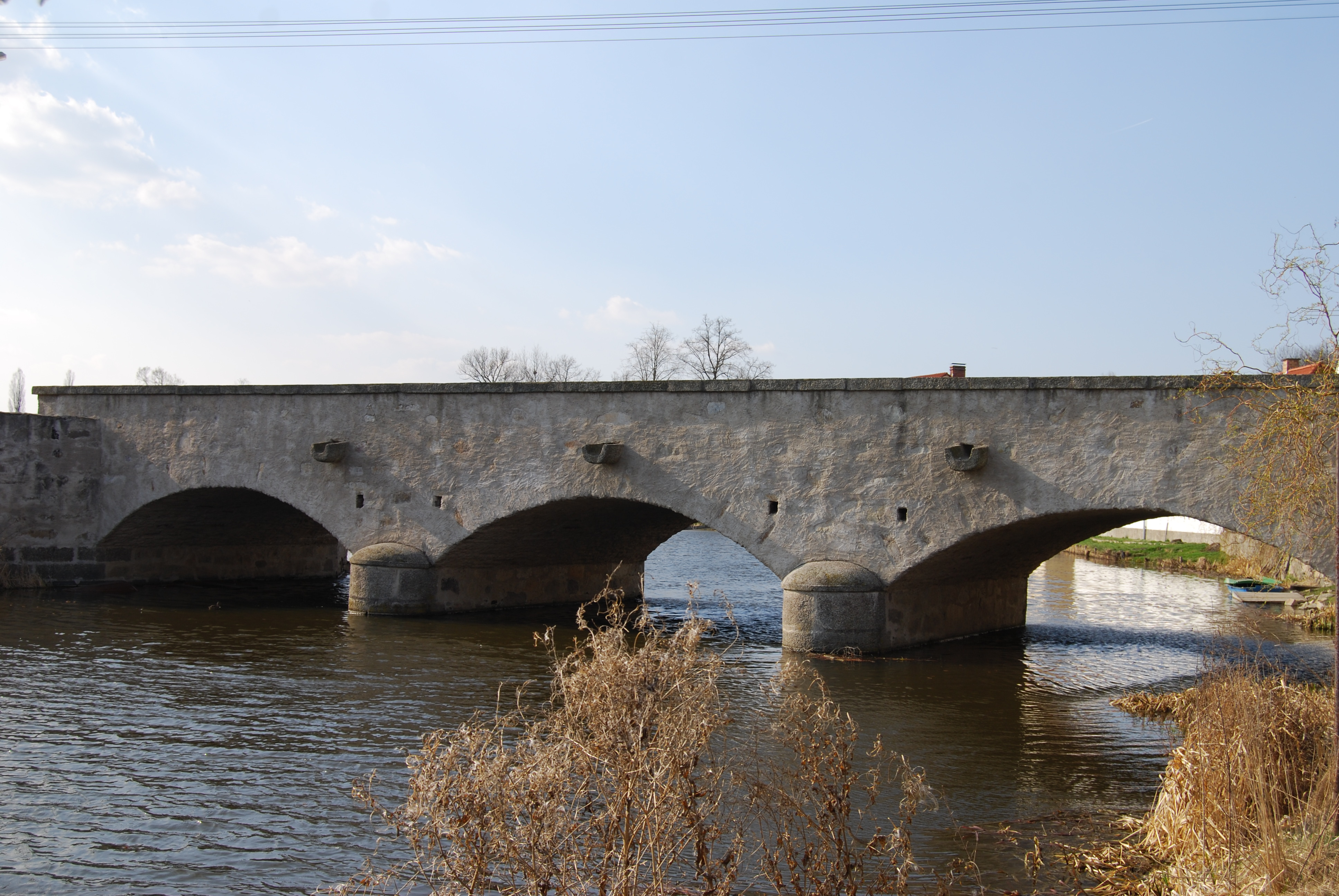 Klasicistní kamenný most přes řeku Blanici. Putim. Okres Písek. Česká republika.